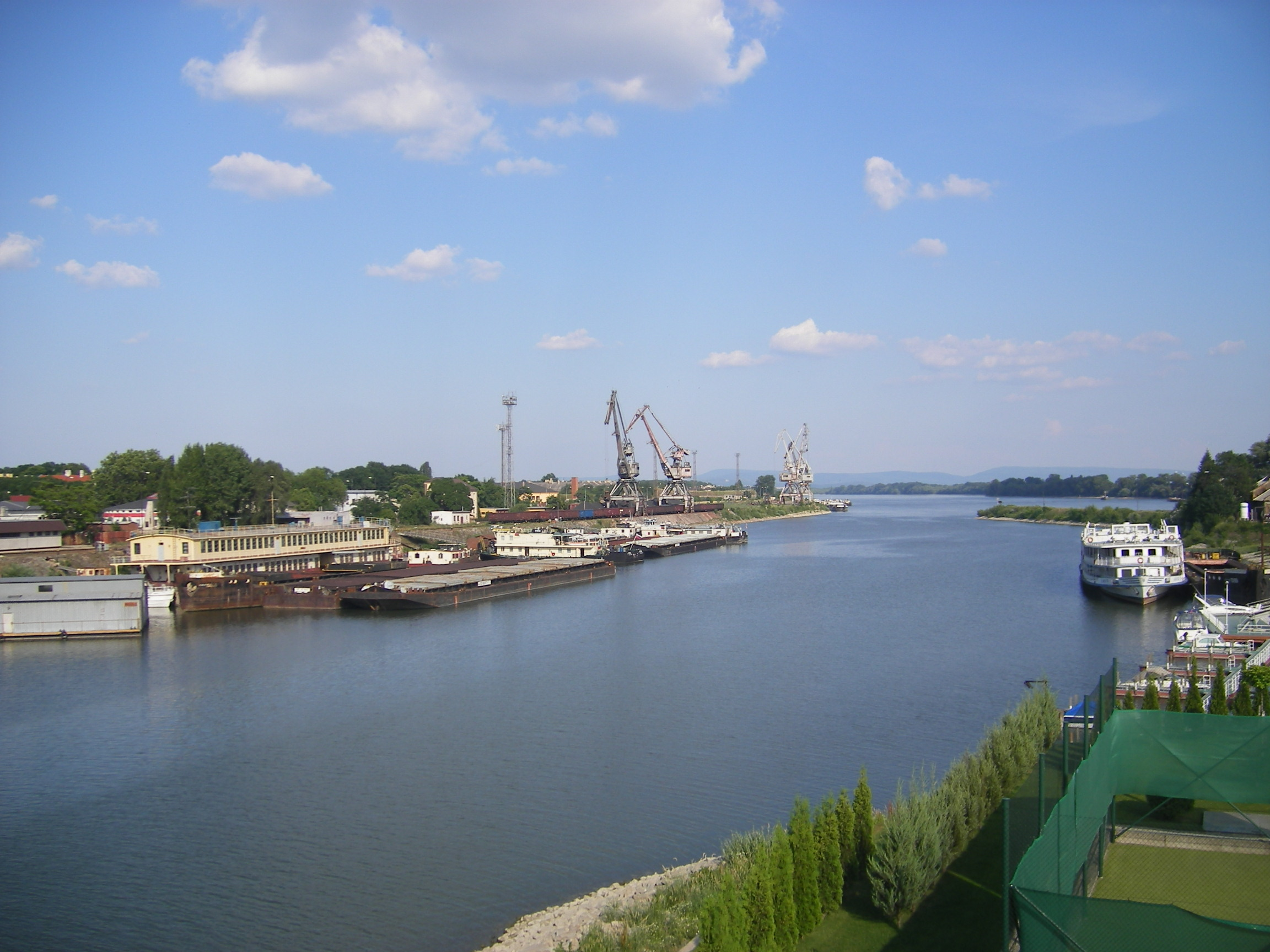 Komárom - a kikötői Duna-ág a csapóhídról